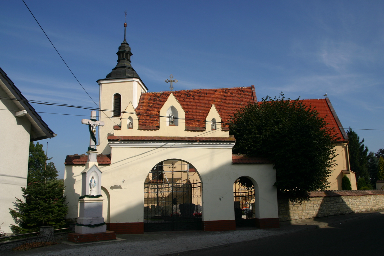 Kierpień - rzymskokatolicki kościół parafialny pw. Narodzenia NMP (nr 85), 1300, 1660, 1792.